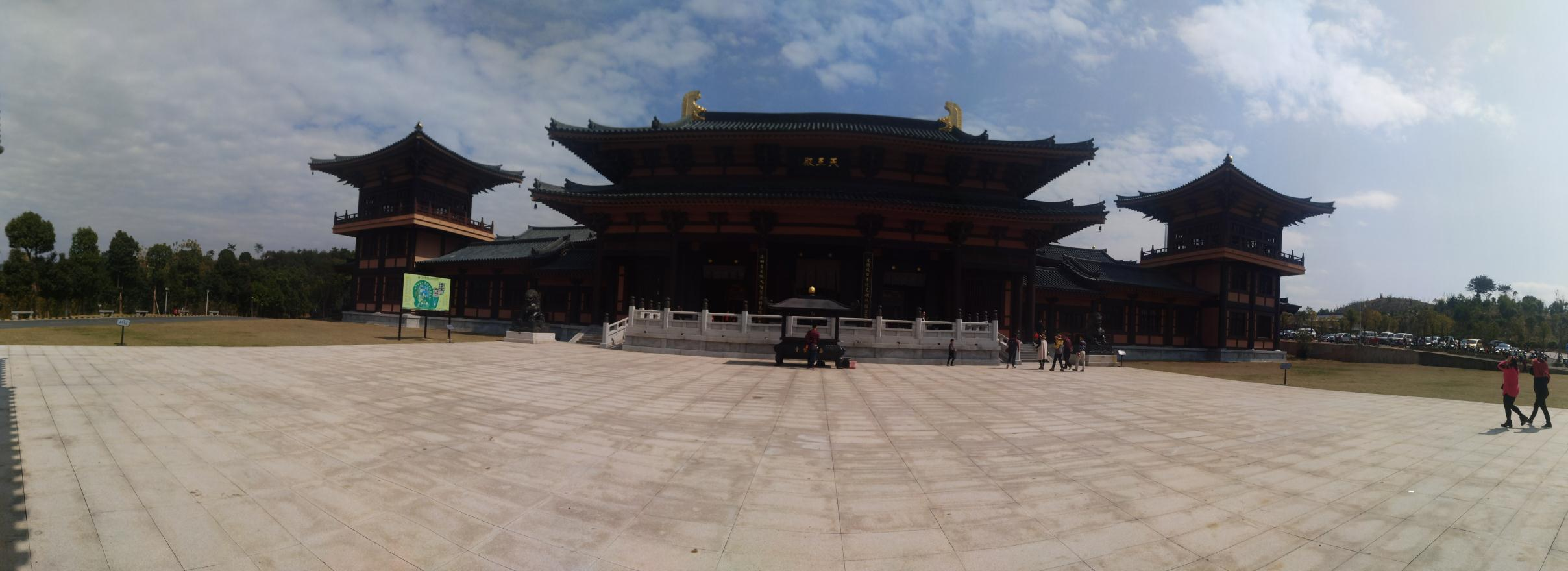 中文（中国大陆）: 这是丰顺留隍县的惠仁圣寺正门全景。